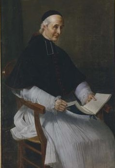 Portait du chanoine Maurice Garrigou (1766-1852)